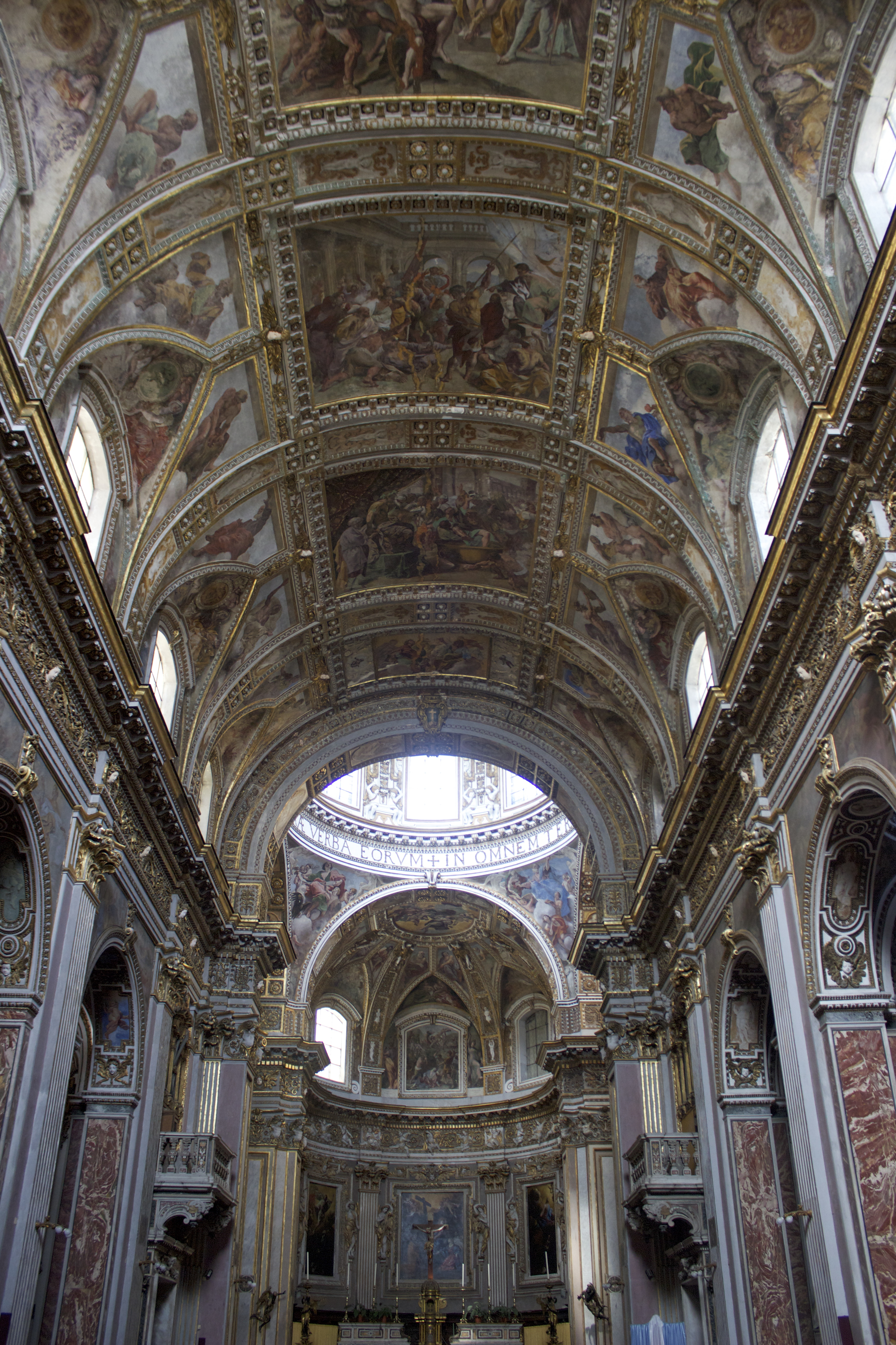 Nápoles. Santi Apostoli. Nave.